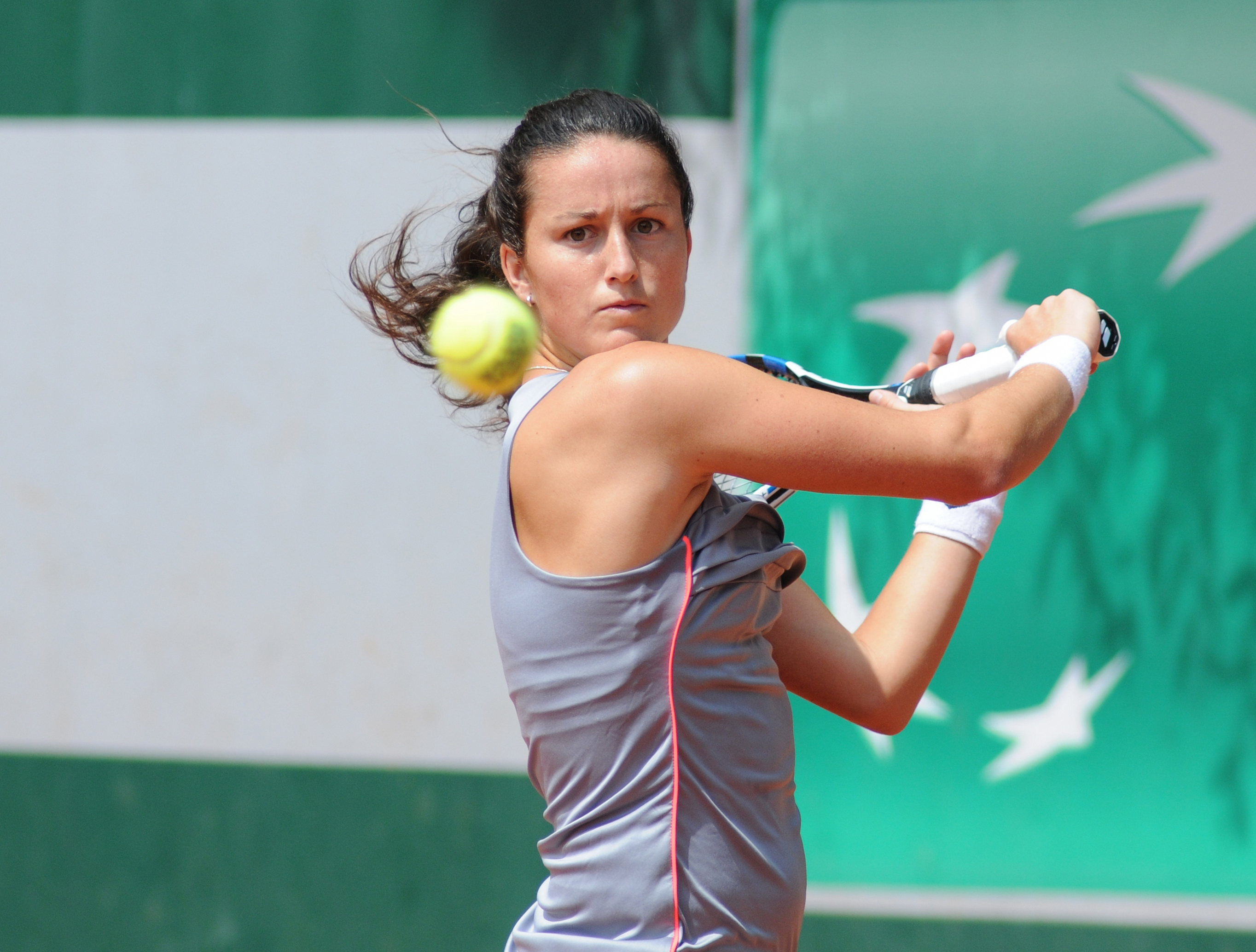 Lara Arruabarrena